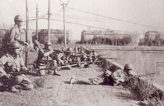 1931年9月19日晨，攻上瀋陽城頭的日軍